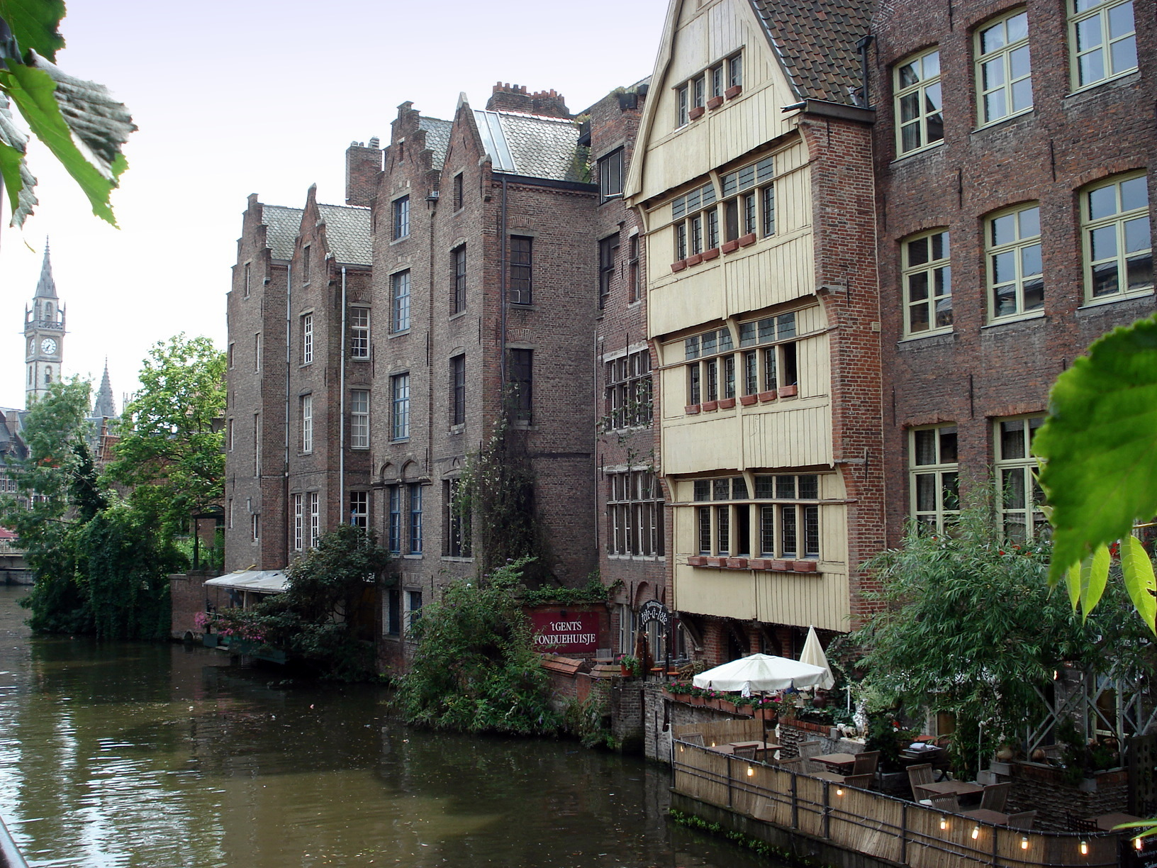 Gent, Lievekanaal nabij verbinding met Leie, gezien vanop Hoofdbrug (Rekelinge). Achtergrond links: toren van voormalig posthoofdkantoor (geb. 1904).